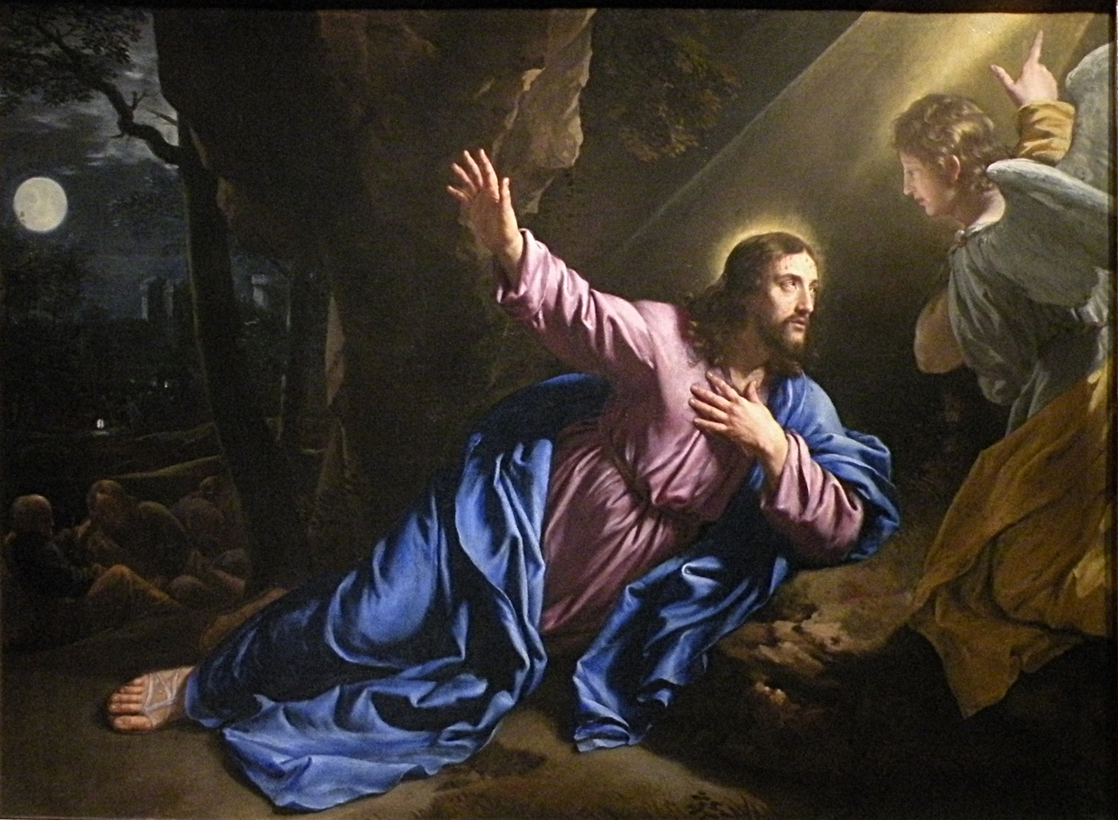 Le Christ au Mont des oliviers, par Philippe de Champaigne. Musée des Beaux-Arts de Rennes.